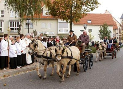 Traditioneller Wendelinsritt der regionalen Reiter und Kutschfahrer in Reilingen